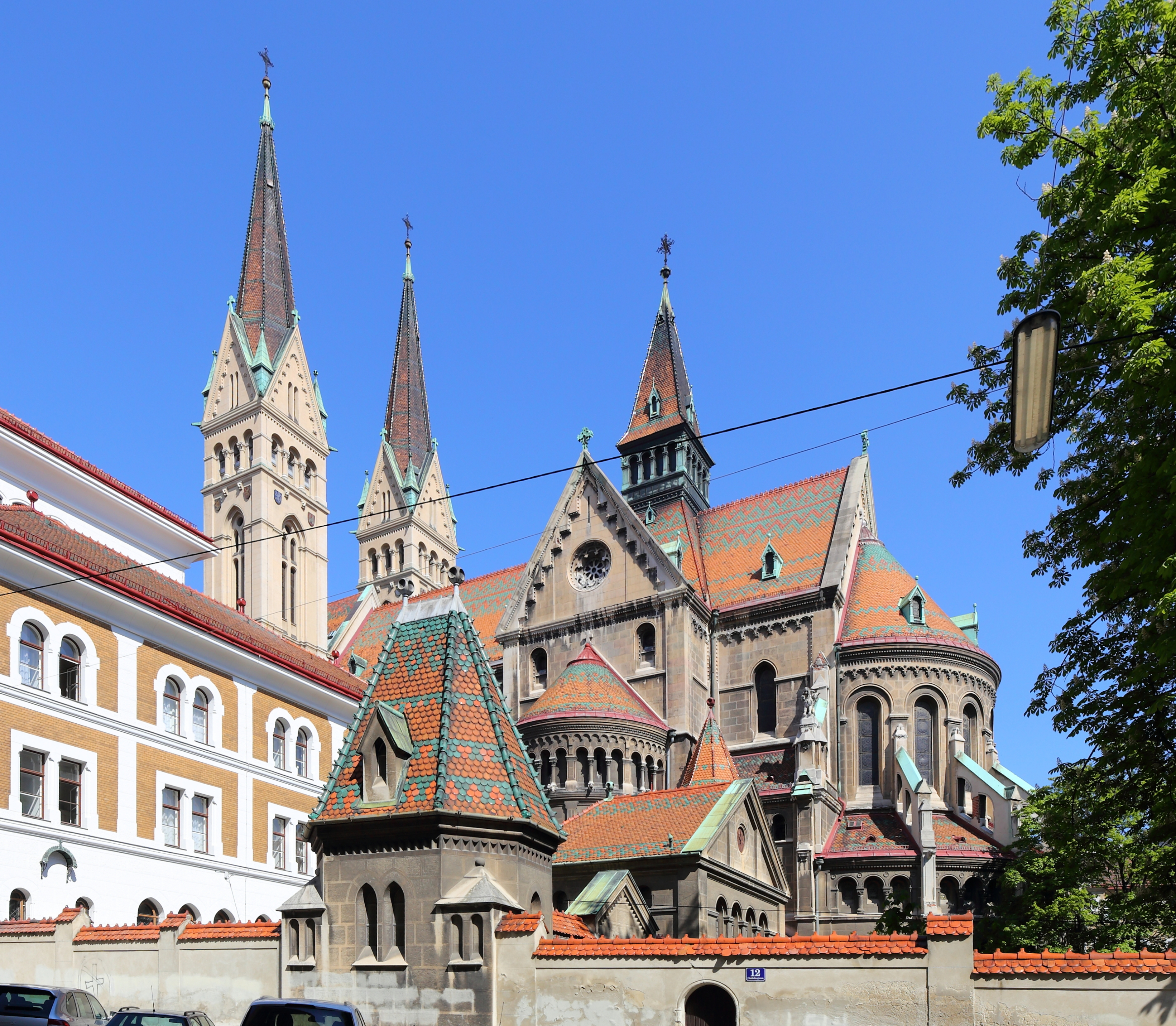 Südostansicht der Canisiuskirche im 9. Wiener Gemeindebezirk Alsergrund.Die Kirche wurde anlässlich dem 300. Todestag (1897) des heiligen Petrus Canisius - Hofprediger und Bischofsvikar von Wien - nach Plänen von Gustav Ritter von Neumann in neuromanischem Stil errichtet und am 18. Oktober 1903 geweiht. Die beiden Türme haben eine Höhe von 85 Meter.